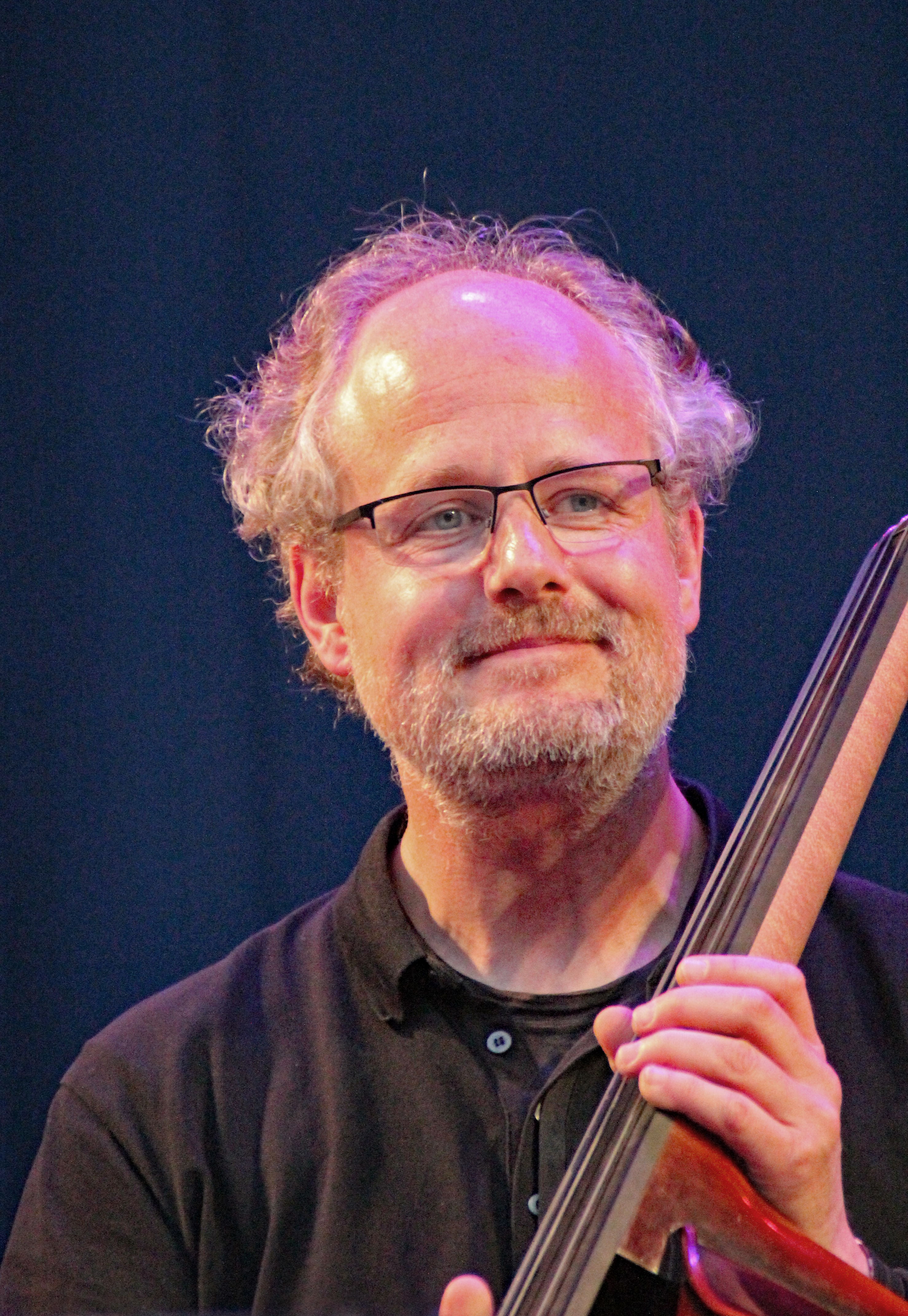 Bildinhalt: Ingmar Heller bei einem Auftritt des Christof-Lauer-Trios im Frankfurter Palmengarten Aufnahmeort: Frankfurt am Main, Deutschland Die dargestellte Person wurde bei einem öffentlichen Auftritt fotografiert.